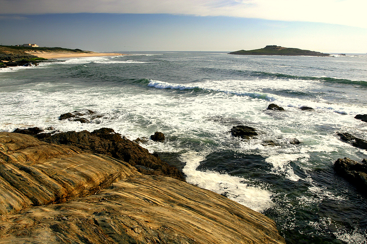 Ilha do Pessegueiro - Sines This file was uploaded for Wiki Loves Monuments in Portugal with the unique identifier 74610.